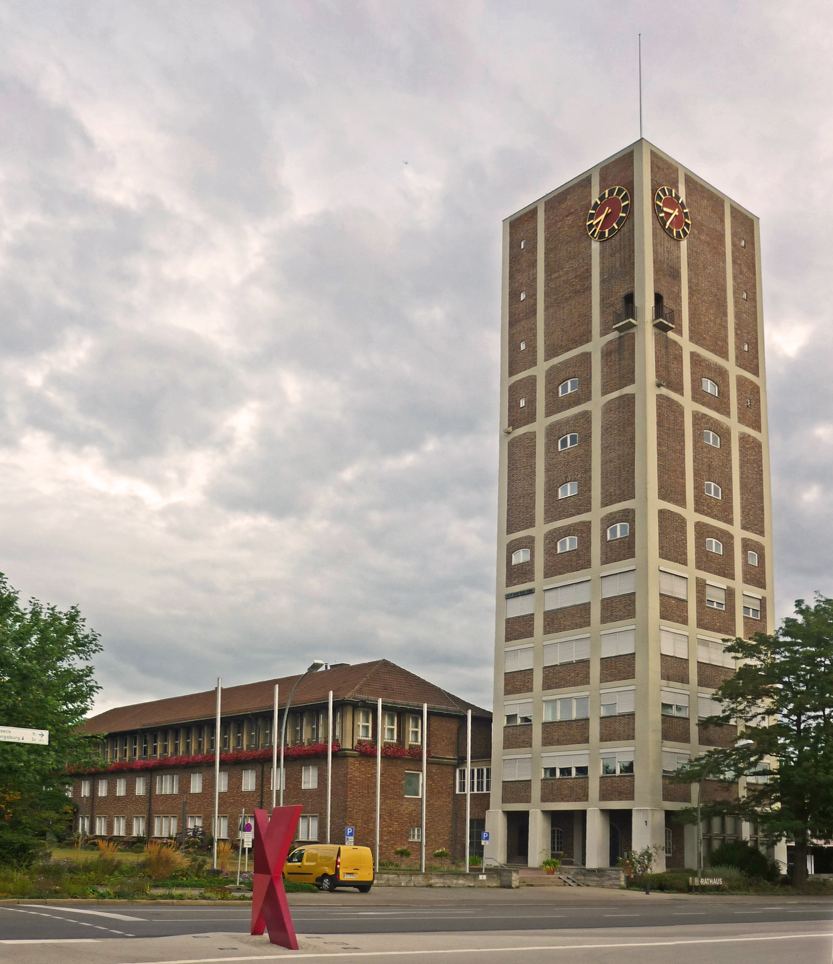 Rathaus und Rathausturm in Kornwestheim